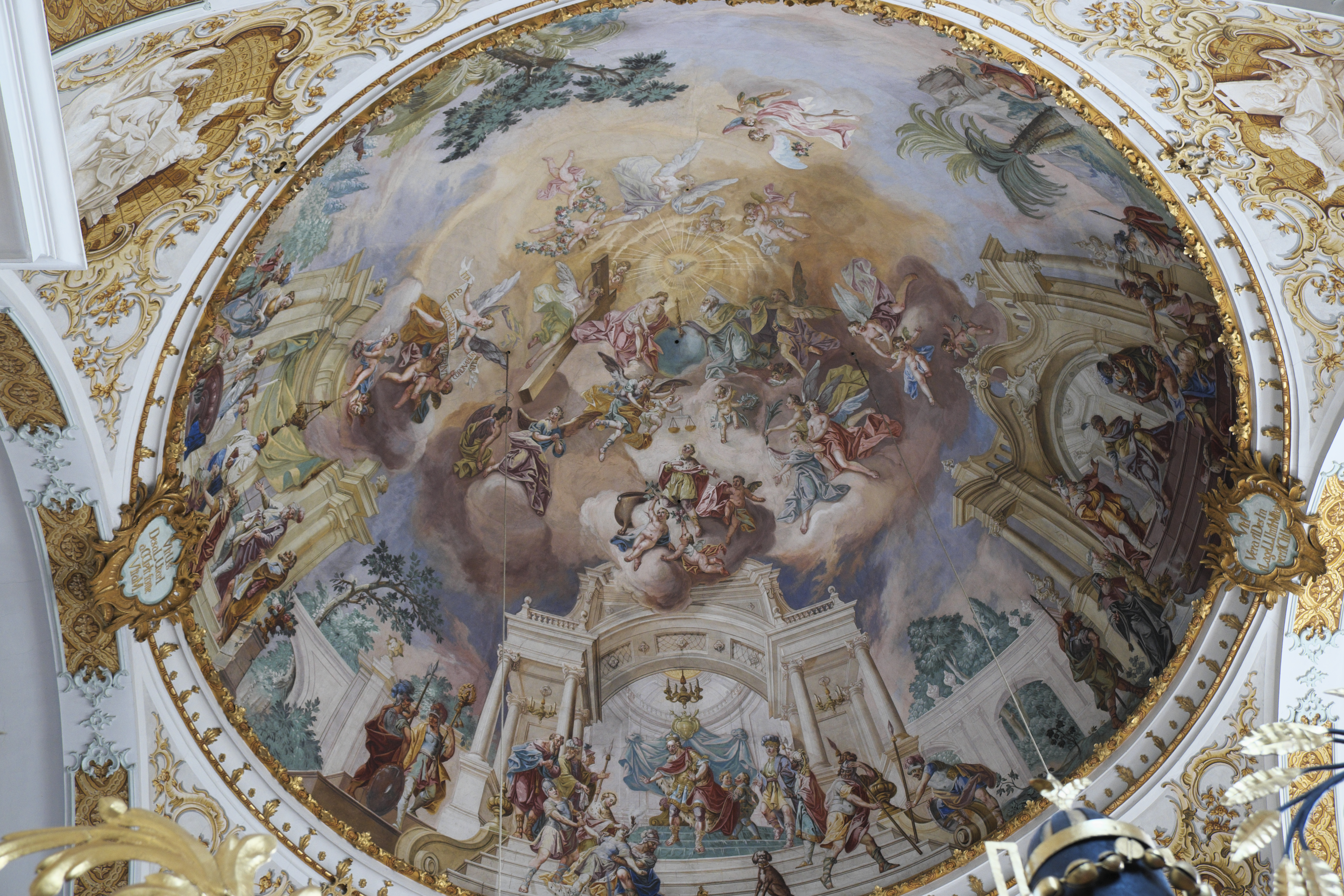 Katholische Pfarrkirche St. Vitus in Kirchweidach im Landkreis Altötting (Bayern/Deutschland), Kuppelfresko von Franz Joseph Soll mit Szenen der Legende des heiligen Vitus